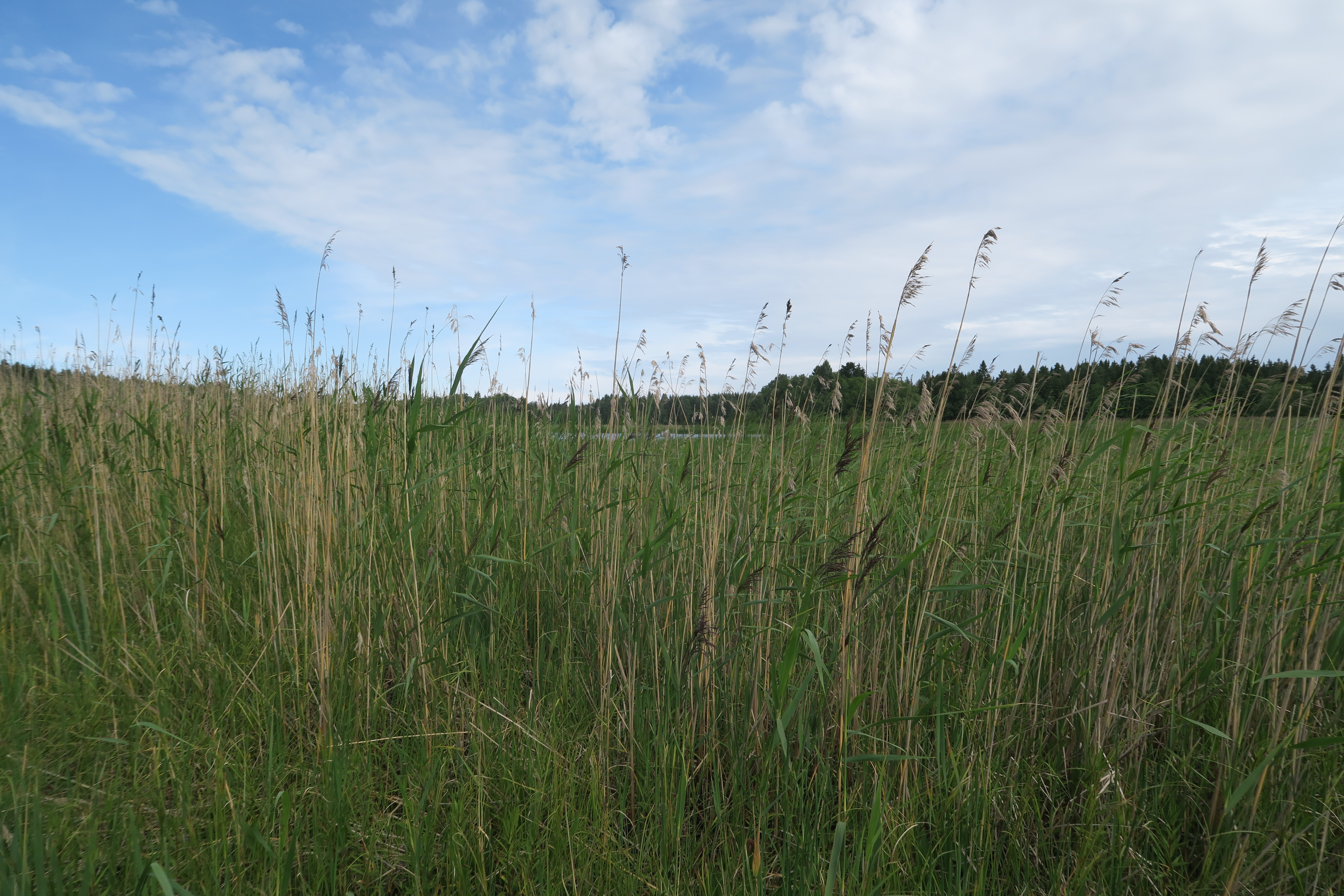 Mustalahtea Ahlaisissa Porissa heinäkuussa 2016